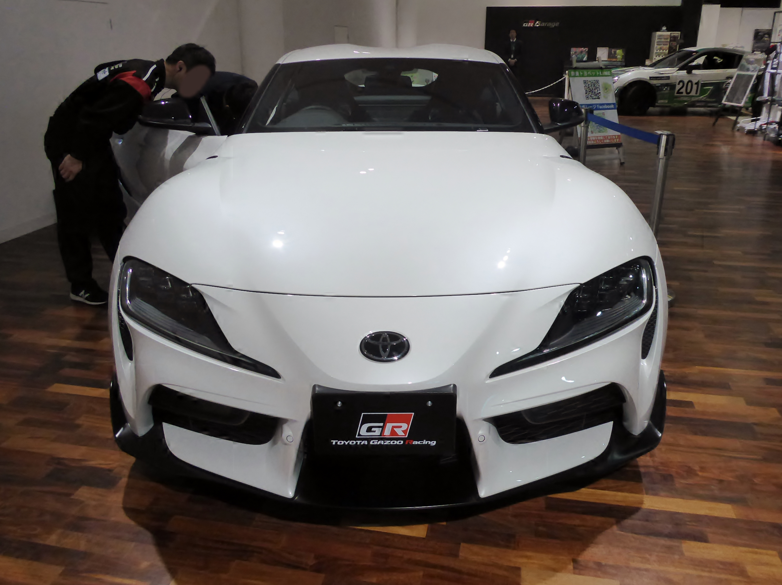 3BA-DB82-ZSRW型トヨタ・GRスープラSZをフロントから撮影。